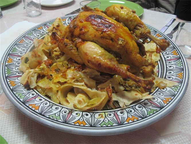 Plat culinaire traditionnel marocain